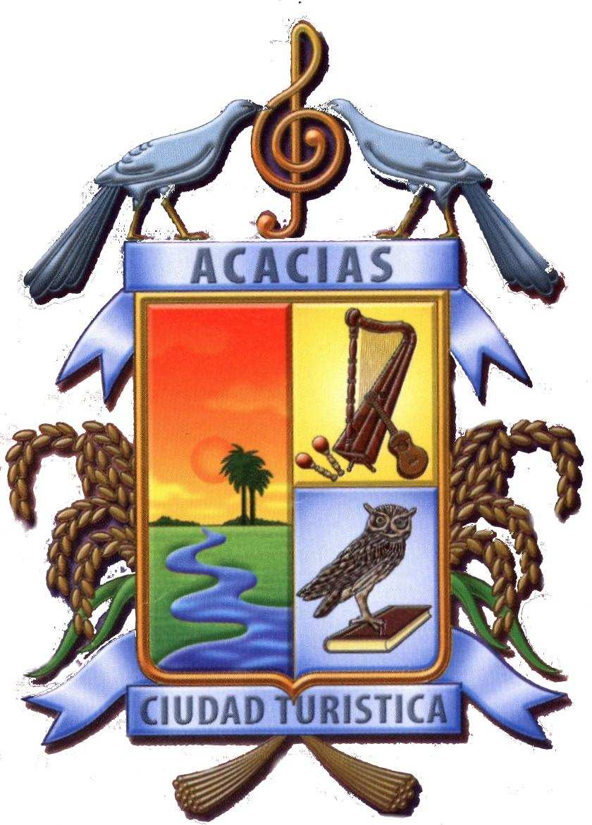 Escudo de Acacias - Meta By 93Darkfloggi